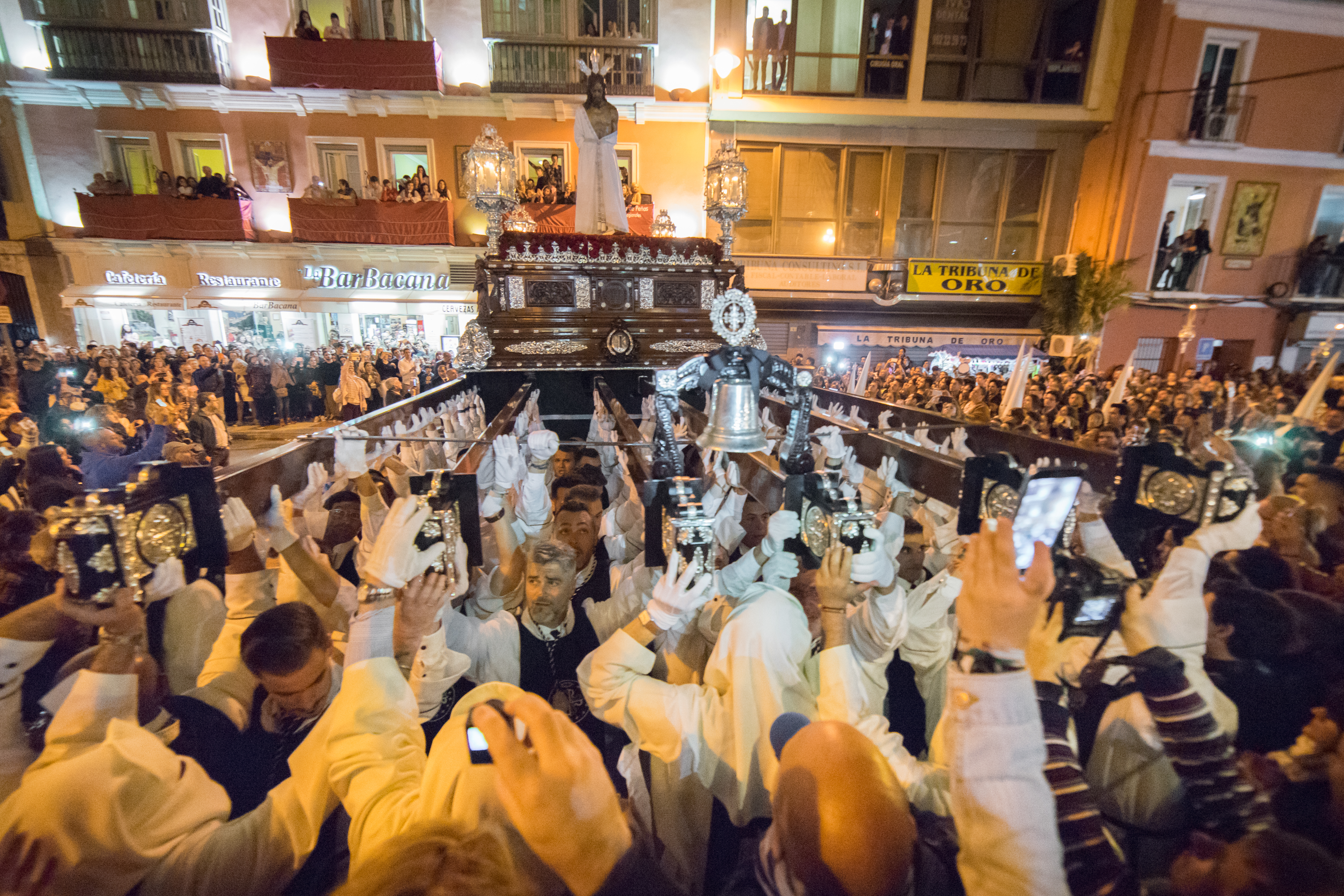 Cristo de la Humillación alzado a pulso en la Tribuna de los Pobres This is a photography of a Folklore festival in Spain (Wikidata id Q9075883).